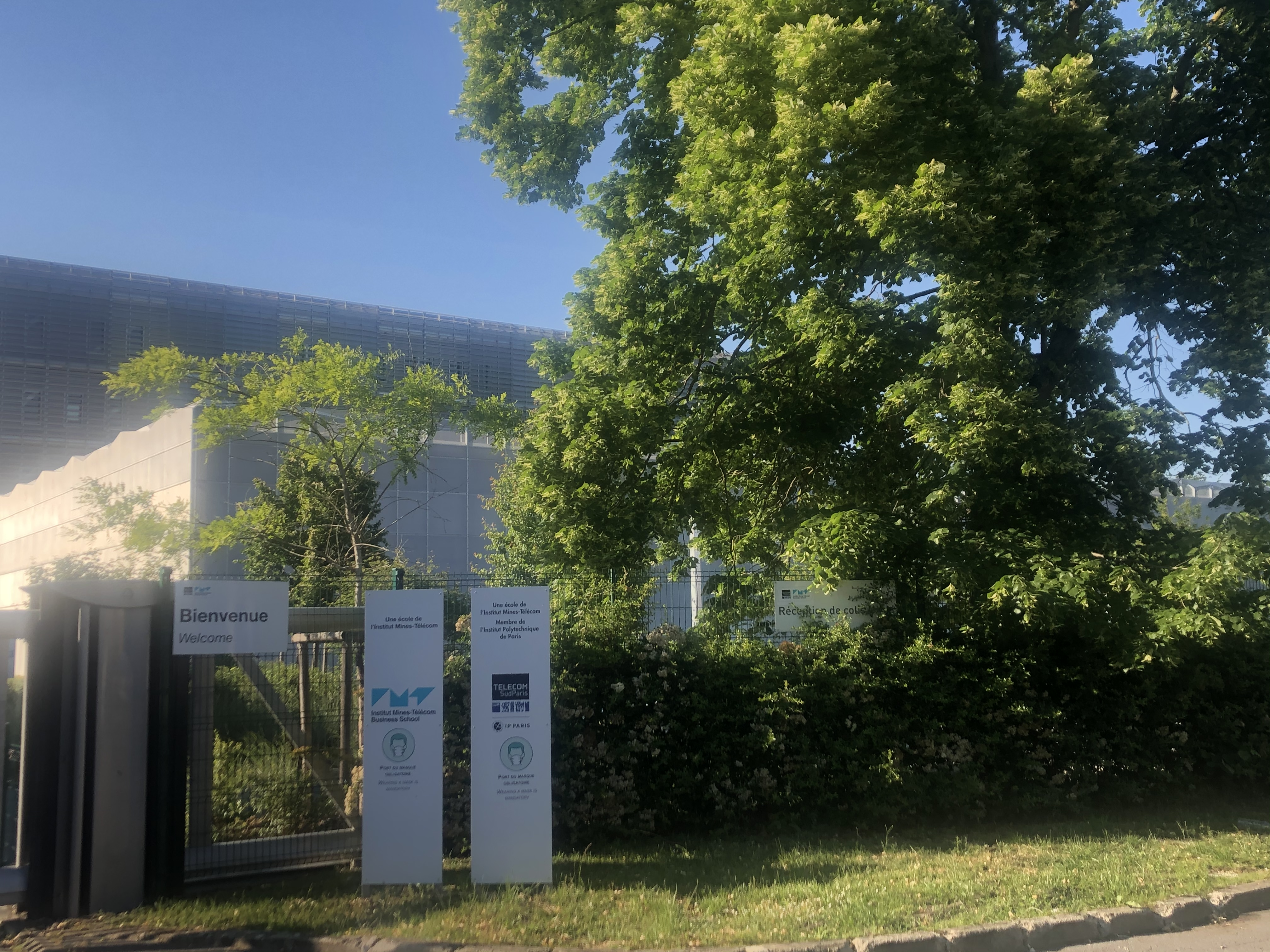 Entrée principale de l’Institut Mines-Télécom Business School